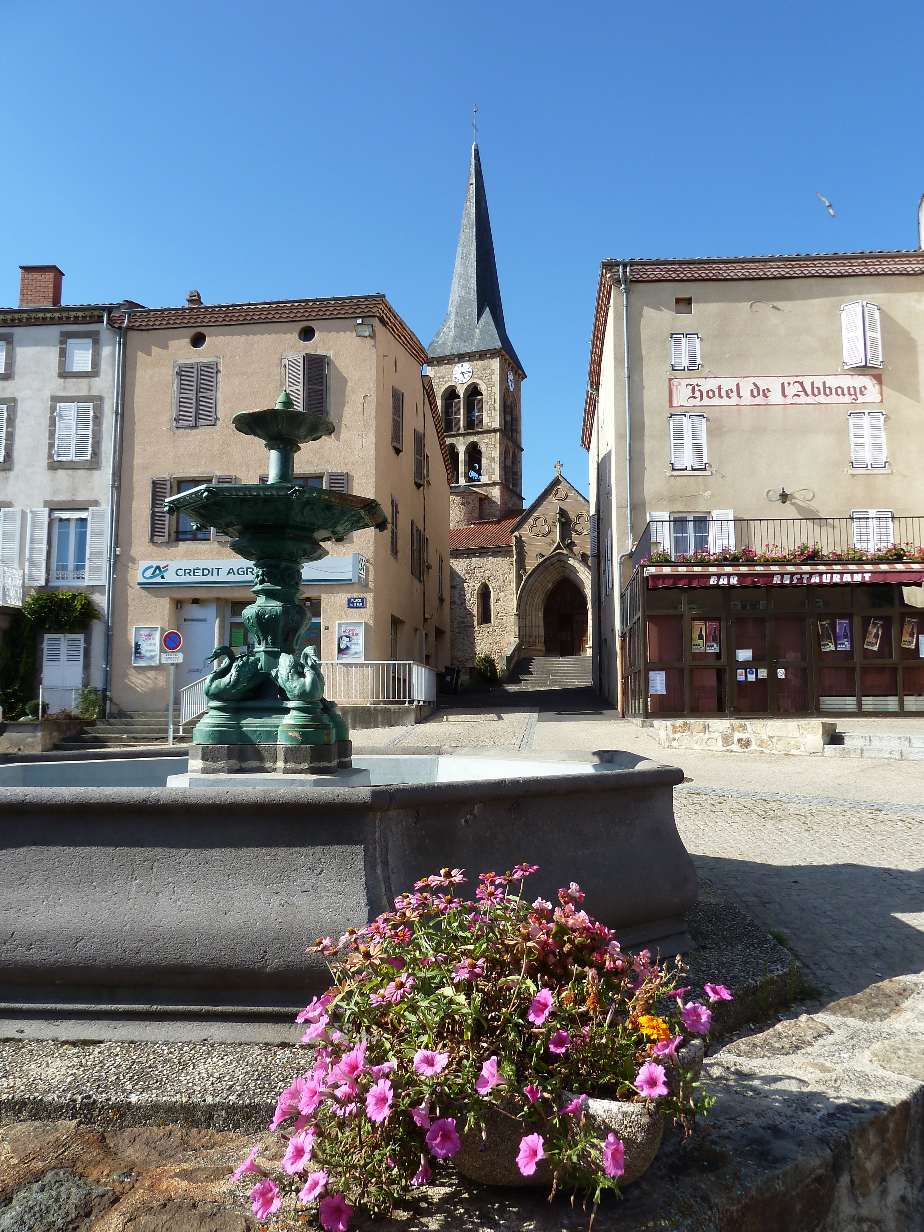 Place centrale du village de Sauxillanges